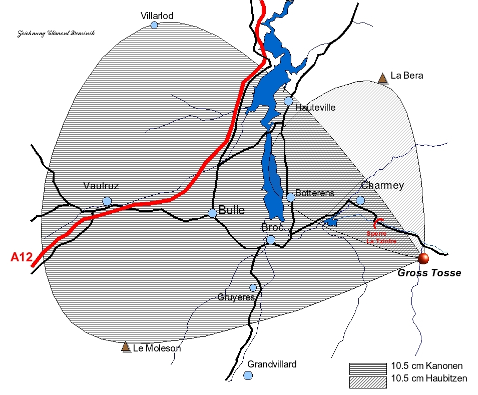 Wirkungsraum der Geschütze vom Festungswerk Gross Tosse